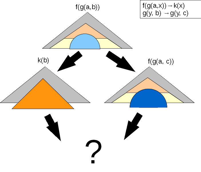 Cas où la confluence locale n'est pas garanti ː paires critiques